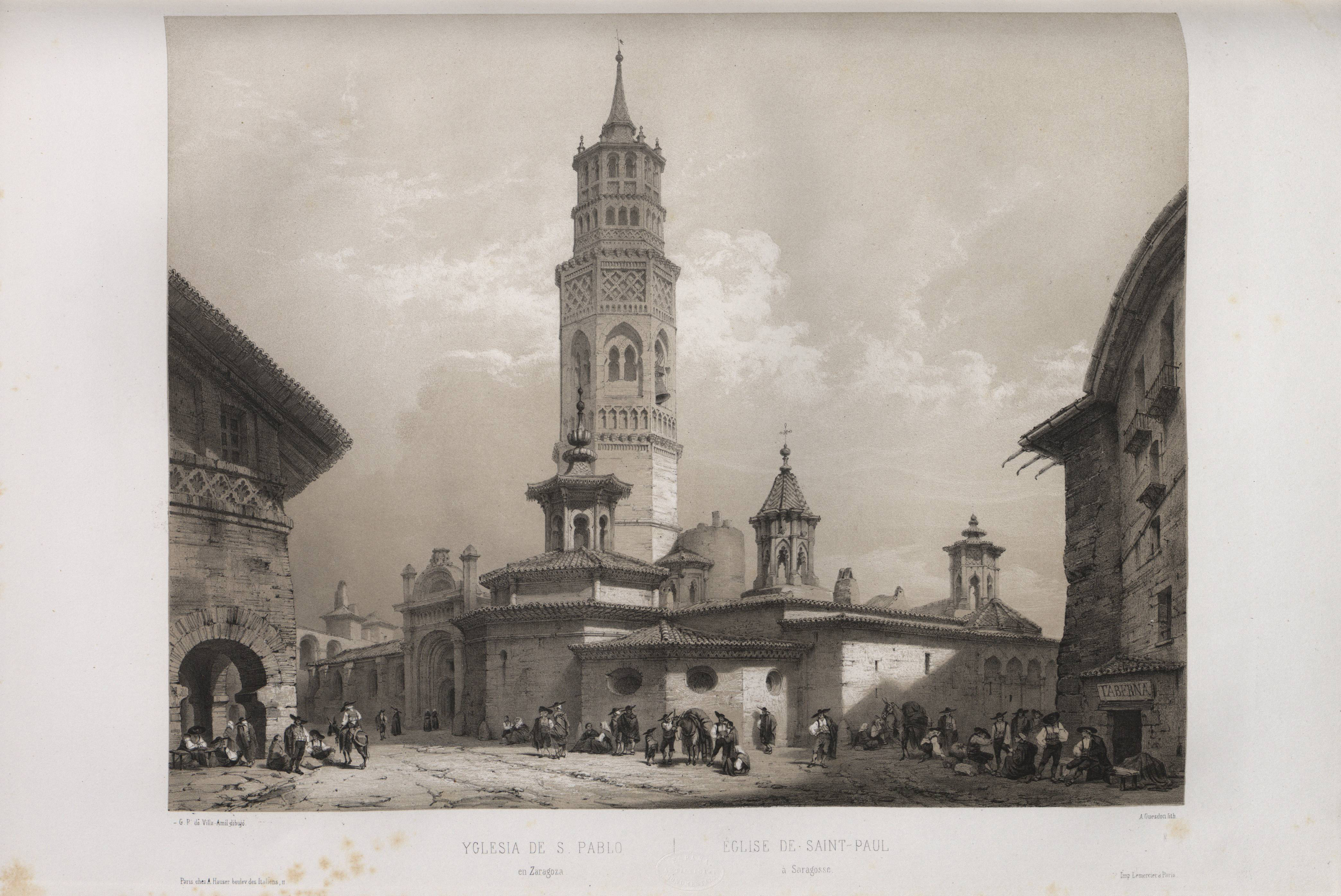 Yglesia de San Pablo en Zaragoza.